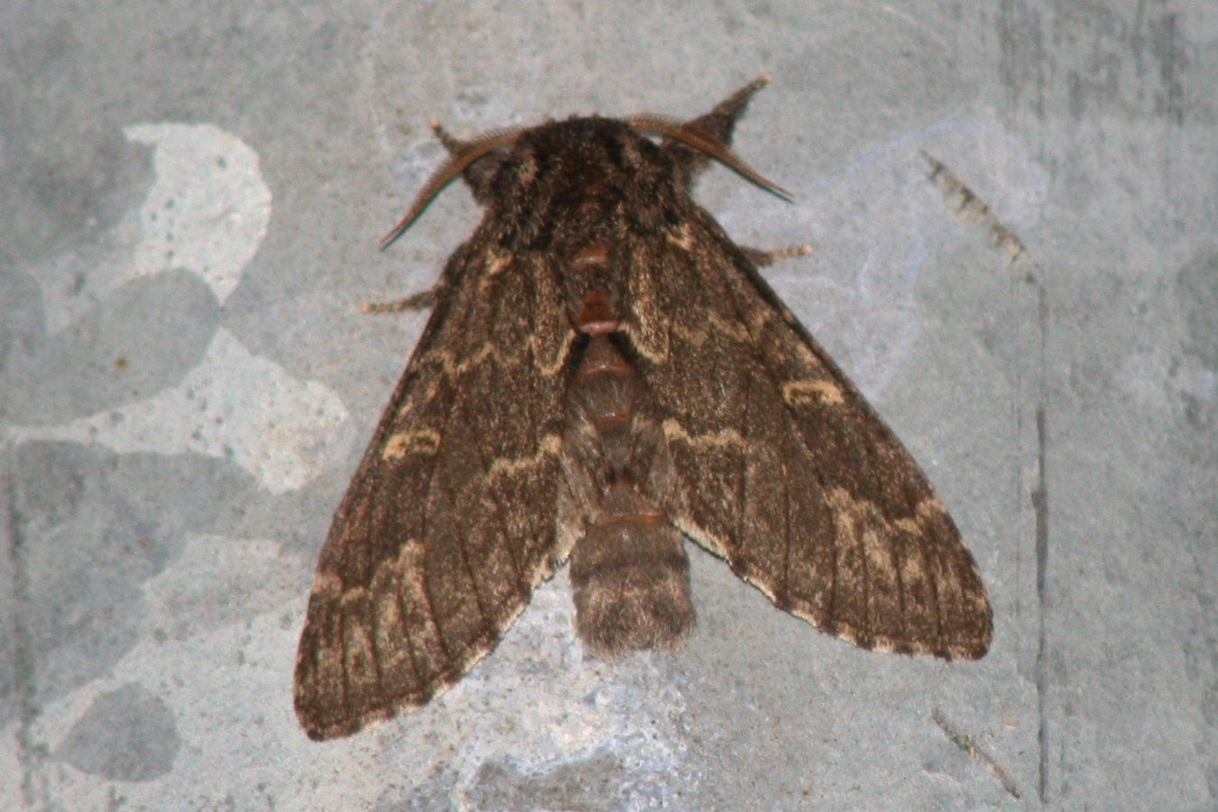 Gelbbrauner Zahnspinner (Notodonta torva)